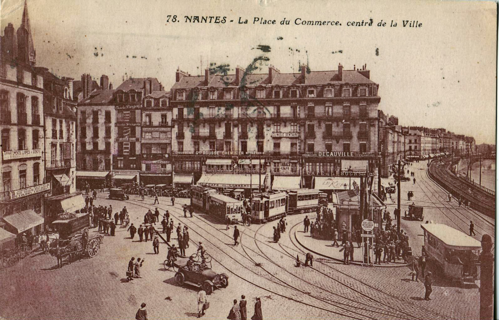 Carte postale semi-moderne éditée par Nozais, n°78 : NANTES - La Place du Commerce, centre de la ville.Vue de rames et de l'implantation de l'ancien tramway de Nantes